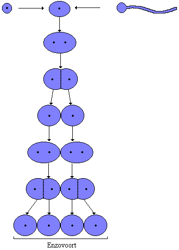 Schematische weergave van het mitose proces